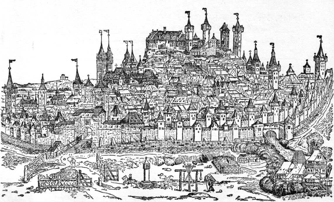 Nürnberg 1493 (Schedel-Stich)